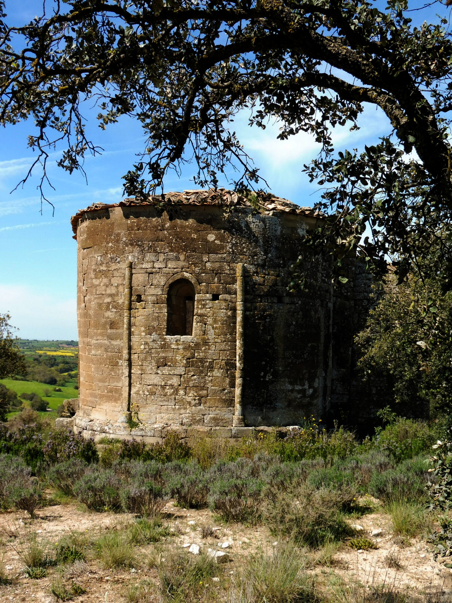 Sant Miquel de Tudela (Cervera): absis